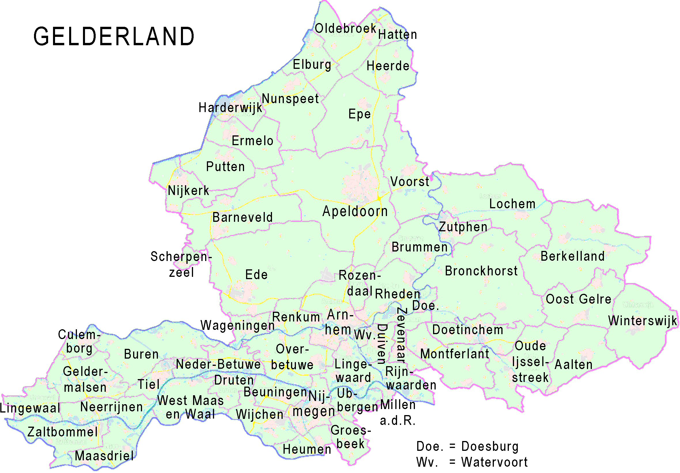 Provincie Gelderland, met indeling van gemeenten (2010). Door Jan-Willem van Aalst, samengesteld uit publiek beschikbare geo-data: Referentie-ondergrond (kustlijn, steden, wegen) gerasterd uit de OpenStreet Map OSM. ( Inhoud is beschikbaar onder de Creative Commons Attribution-ShareAlike 3.0 license. Vectorgrenzen van gemeenten en regio's vrij ter beschikking gesteld met dank aan cartografen van brandweerregio's Hollands-Midden en IJsselland; gerasterd in Photoshop. Overige kenmerken op de kaart: eigen tekenwerk van Jan-Willem van Aalst, op basis van gerasterde gemeentegrenzen.